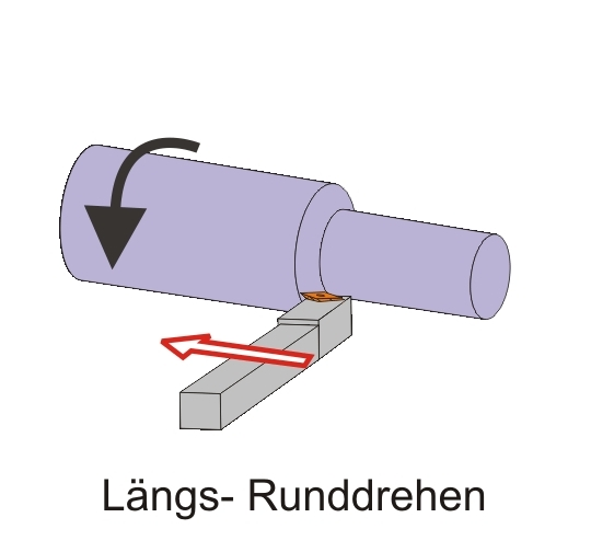 Längsrunddrehen